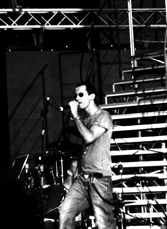 Ivry lider, 'Volume Tel-Aviv' 2006